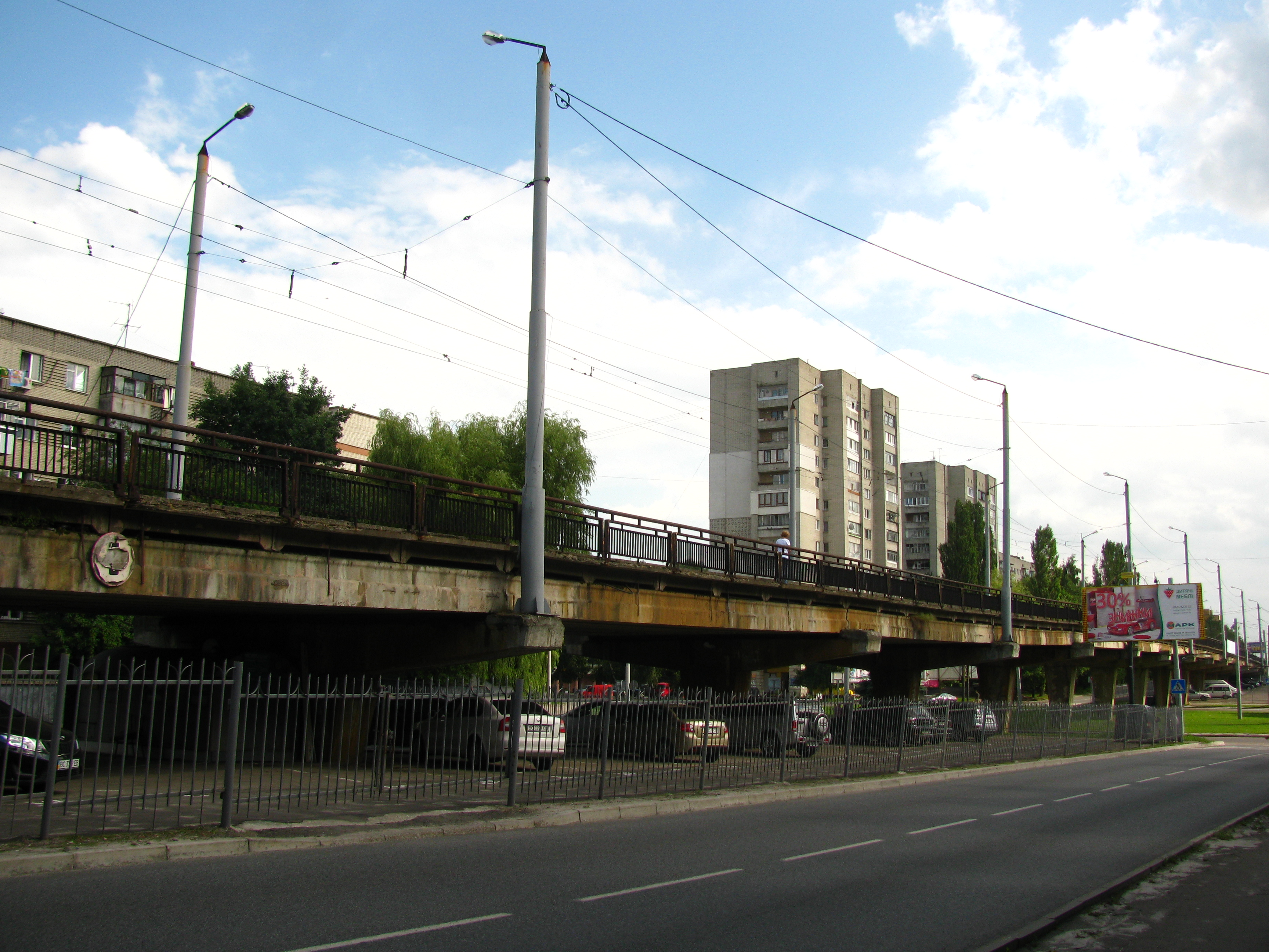 Трамвайний шляхопровід по вулиці Княгині Ольги над розв*язкою вулиць Княгині Ольги і Володимира Великого, збудований у 1980-х роках в рамках будівництва в місті швидкісного частково підземного трамвая